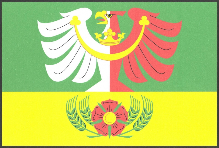 vlajka, Chrbonín, okres Tábor